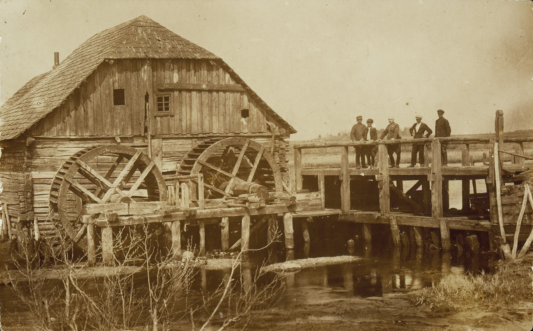 Беларуская (тарашкевіца): Эйшышкі (Ejšyški), рака Вярсока (Viarsoka). Млын